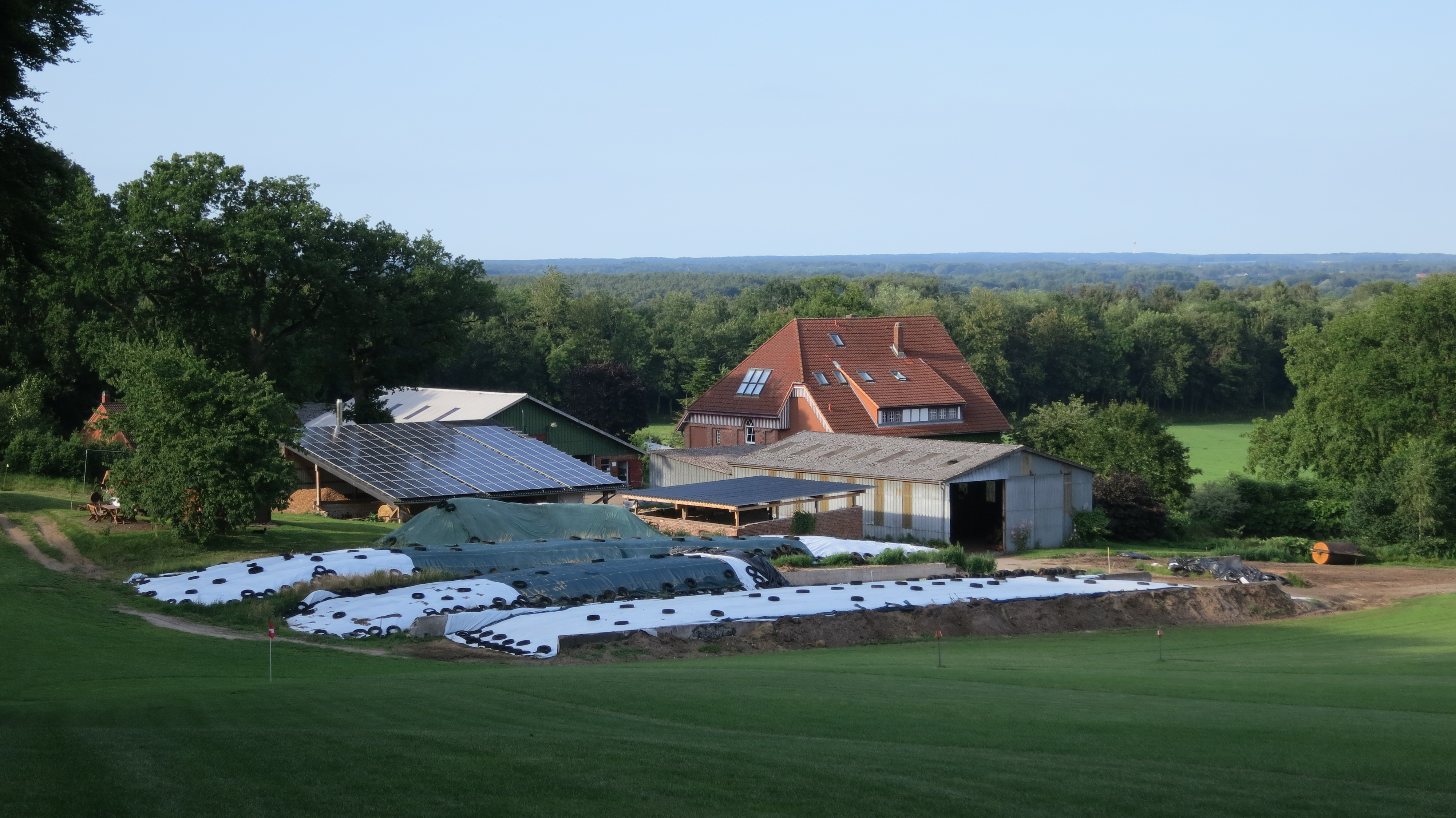 Der Hof Basten an der Grenze von Itzehoe zu Oelixdorf, Blick nach Nordnordosten über das Rantzautal.